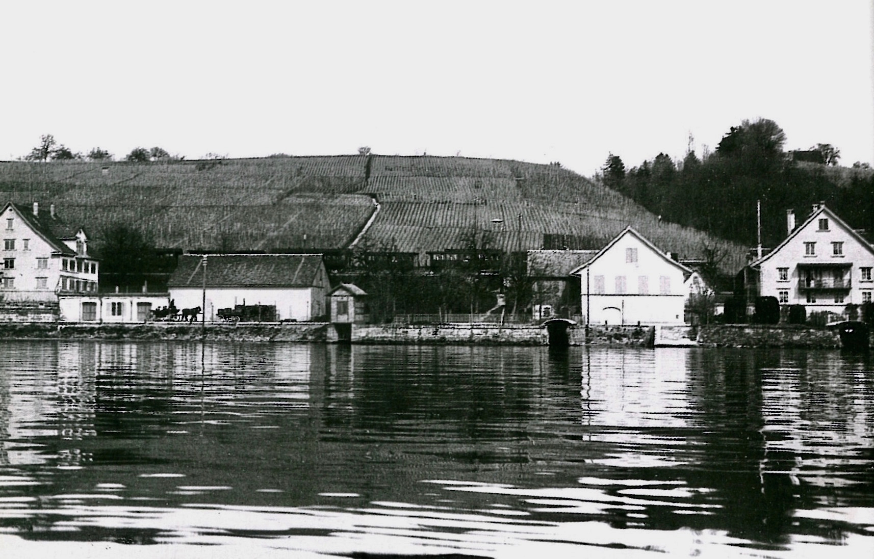 Rechtsufrige Zürichseebahn in Zollikon, um 1905